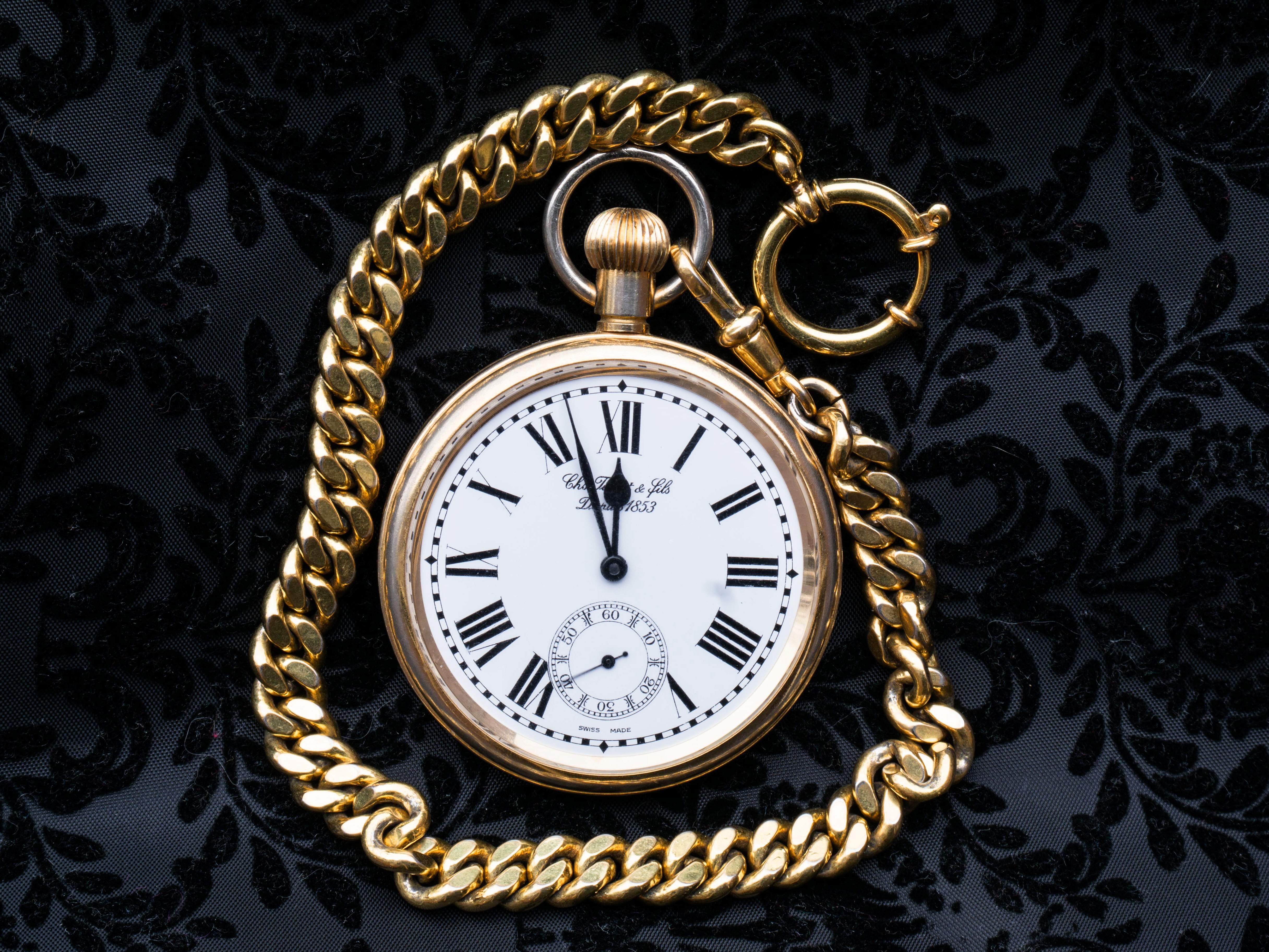 회중 시계.